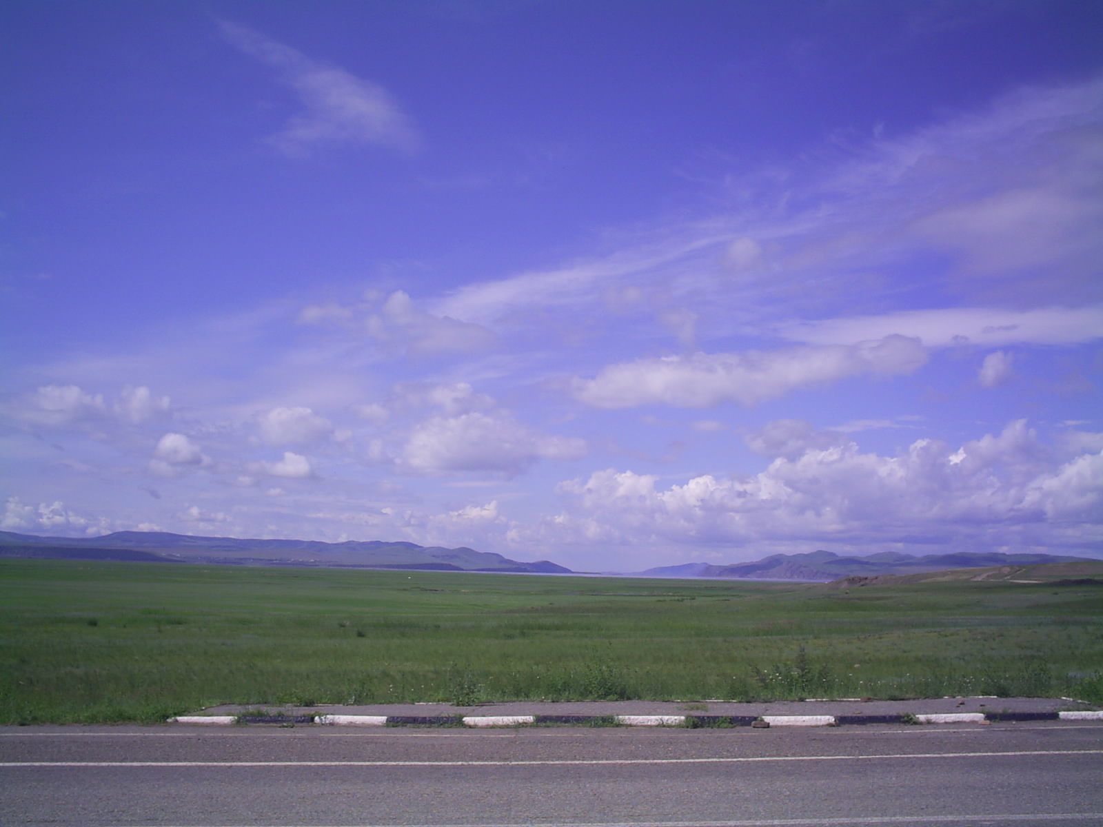 Разлив реки Туба в районе впадения в Красноярское водохранилище